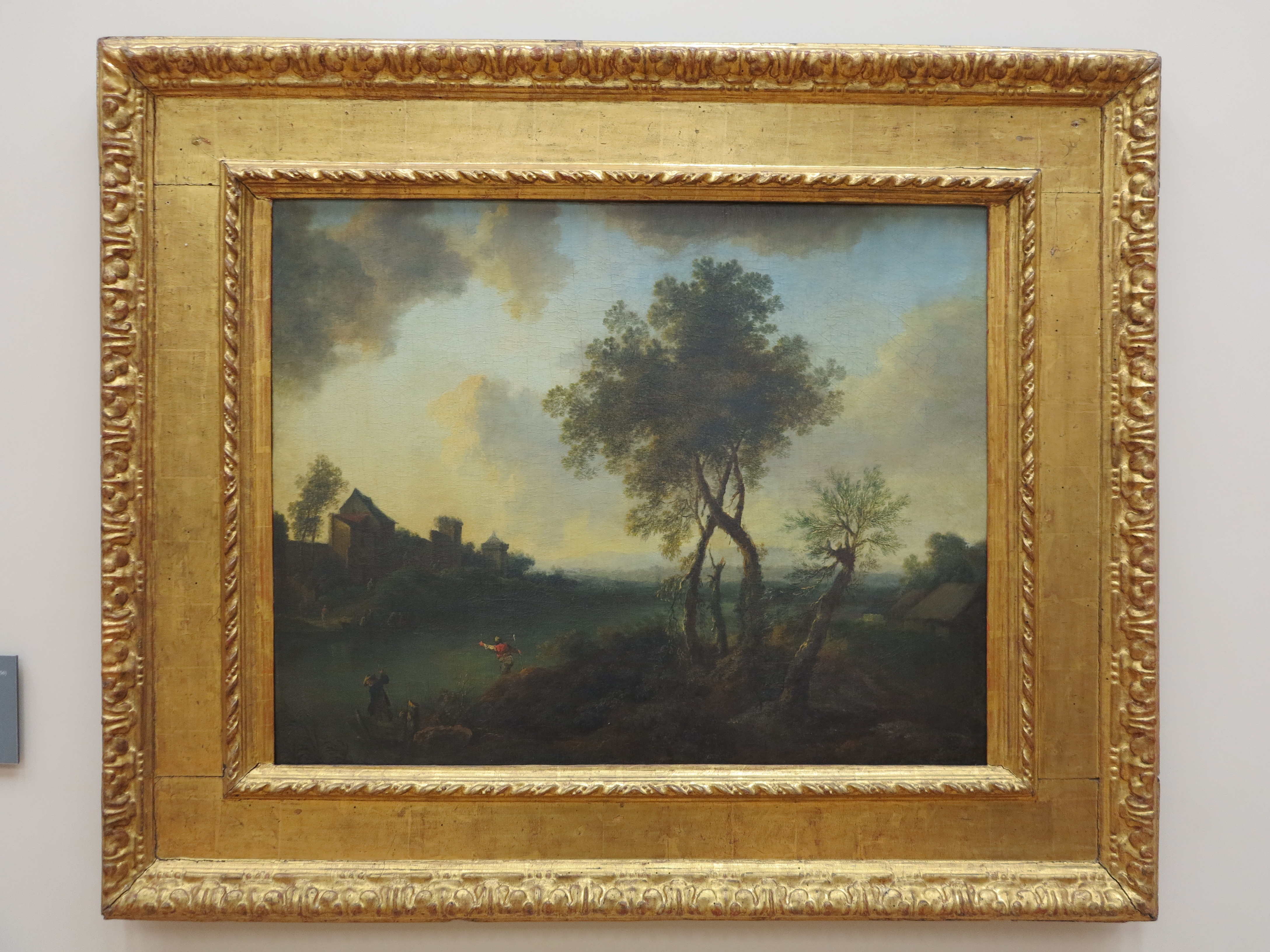 Galleria G. Franchetti alla Ca' d'Oro - MIBAC This is a photo of a monument which is part of cultural heritage of Italy.